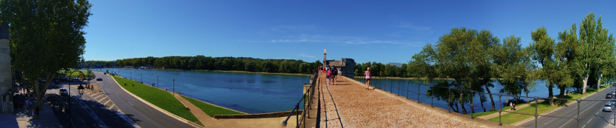 Panorama sur les bord du rhône depuis le Pont d'Avignon